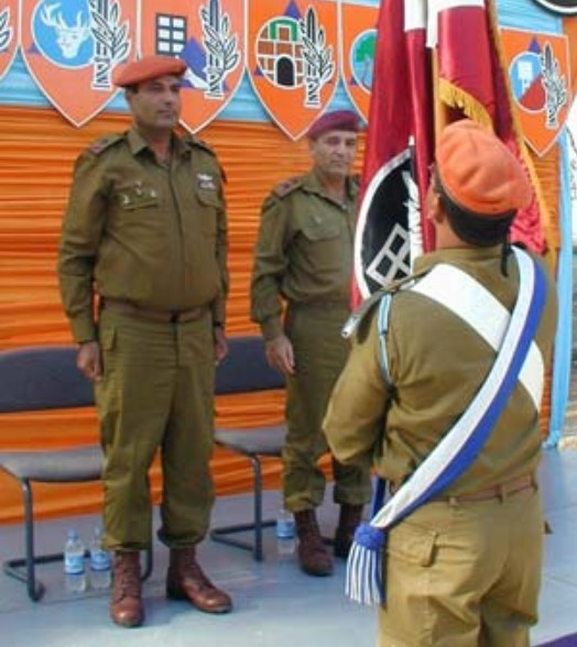 מפקד פיקוד העורף הנכנס, האלוף יוסף מישלב נכנס לתפקידו. בתמונה: הרמטכ"ל שאול מופז (מימין) ומפקד פיקוד העורף הנכנס, האלוף יוסף מישלב (משמאל).